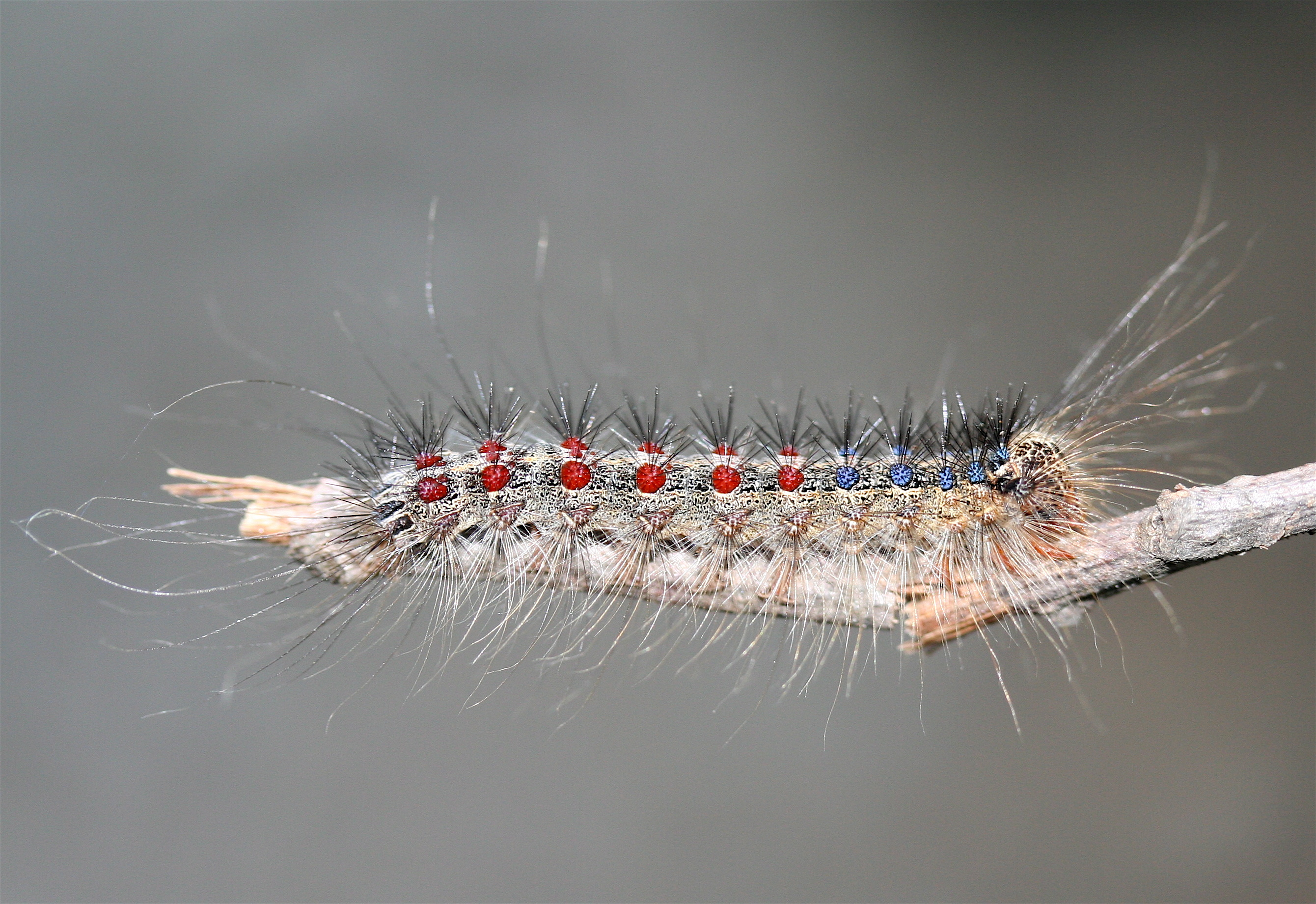 Lepidoptera - Caterpillar